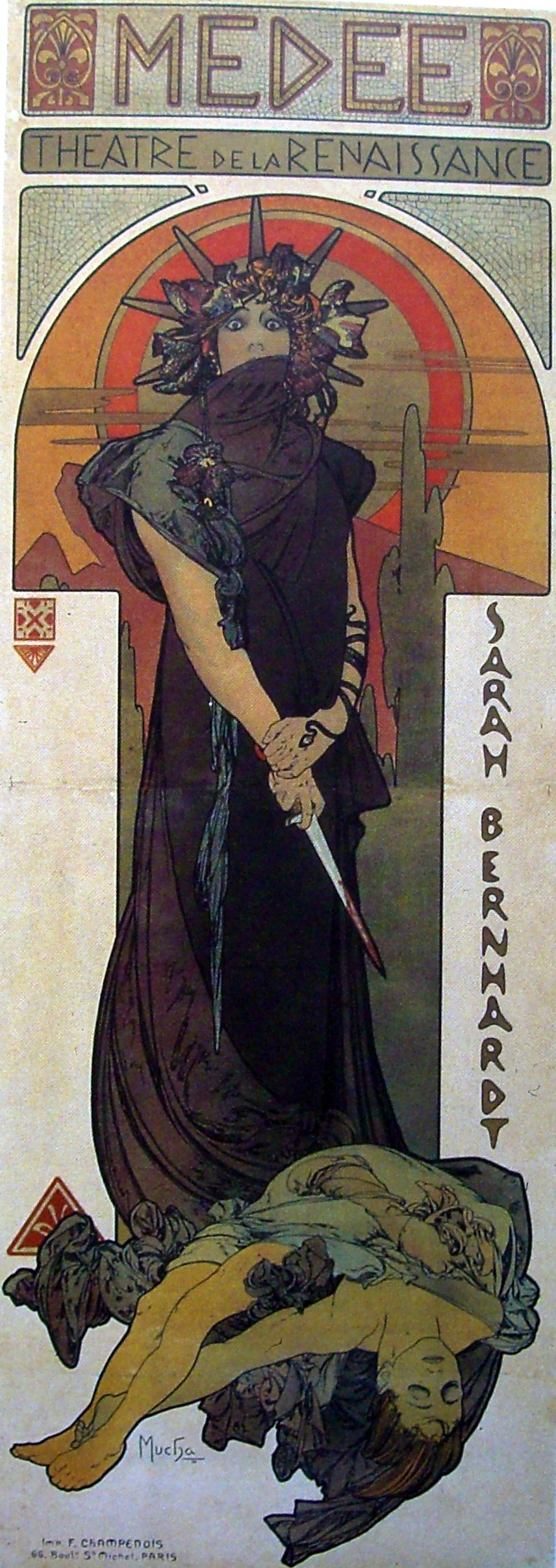 Зодиак (календарь Мухи)